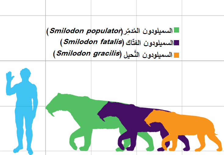 مُقارنة بين أحجام الأنواع الثلاثة المُنتمية لِجنس السميلودون: السميلودون المُدمِّر (بالأخضر)، السميلودون الفتّاك (بالبنفسجي)، السميلودون النَّحيل (البُرتُقالي).